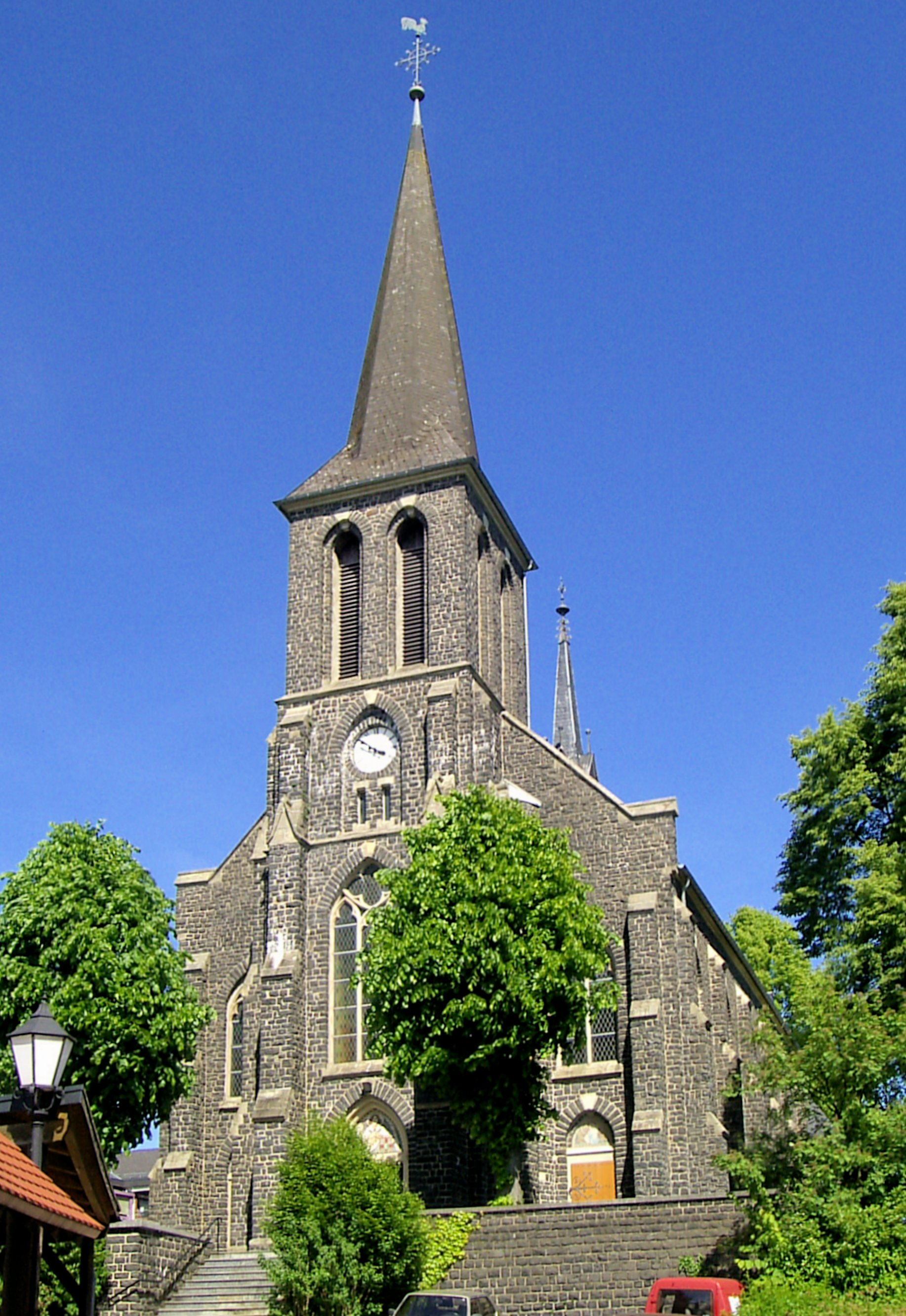 katholische Kirche St. Jacobus in Rosenheim (Landkreis Altenkirchen), Rheinland-Pfalz, Deutschland